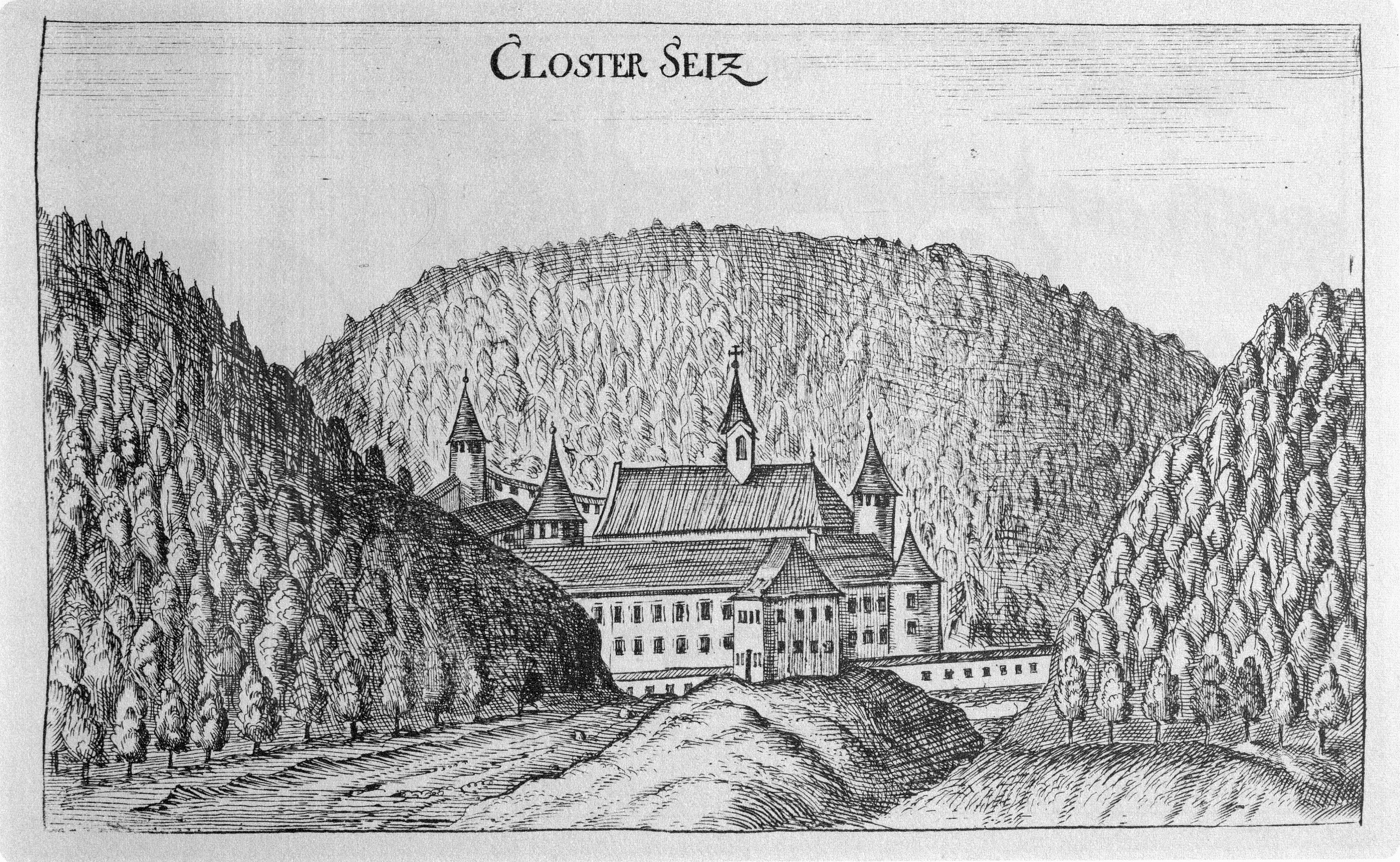 G. M. Vischers Käyserlichen Geographi, Topographia Ducatus Stiriae, Das ist: Eigentliche Delineation / und Abbildung aller Städte / Schlösser / Marcktfleck / Lustgärten / Probsteyen / Stiffter / Clöster und Kirchen / so es sich im Herzogthumb Steyrmarck befinden; Und anjetzo Umb einen billichen Preyß zu finden seynd Bey Johann Bitsch Universitäts Buchhandlern / Auff dem Juden=Platz bey der guldenen Saulen. Graz 1681 Die Nummerierung der Dateien folgt der alphabetischen Reihung der Ortsnamen und entspricht nicht dem Vischer-Register